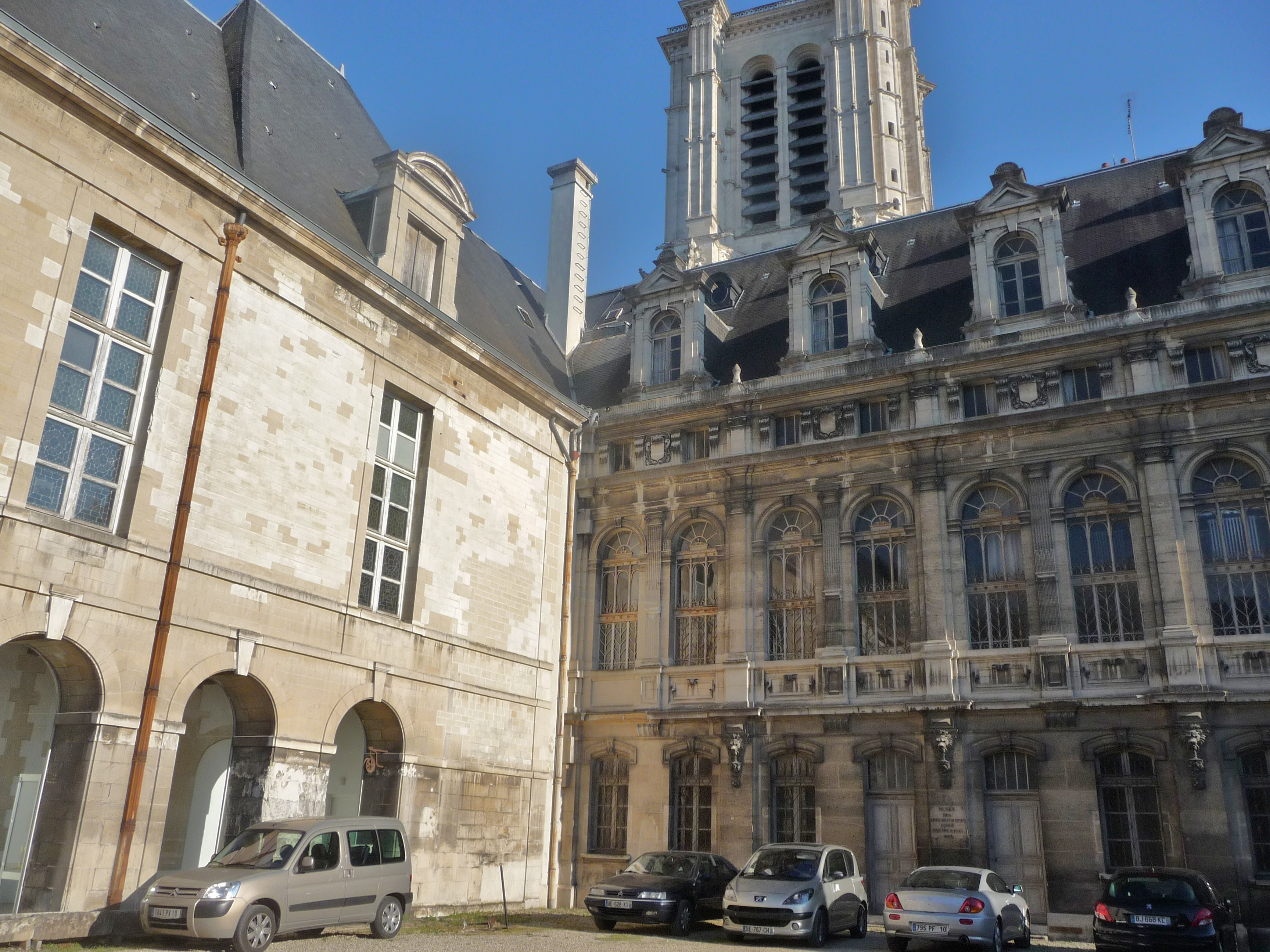 Ne subsiste que la façade de gauche, comportant des arcades, dans la cour de l'actuel Musée des Beaux-Arts. L'autre édifice date du XIXe siècle.